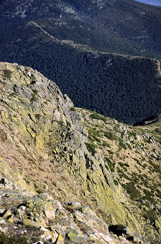 Puerto de Navafría, between the Community de Madrid and Castilla y León. Sierra de Guadarrama, Sistema Central, Spain